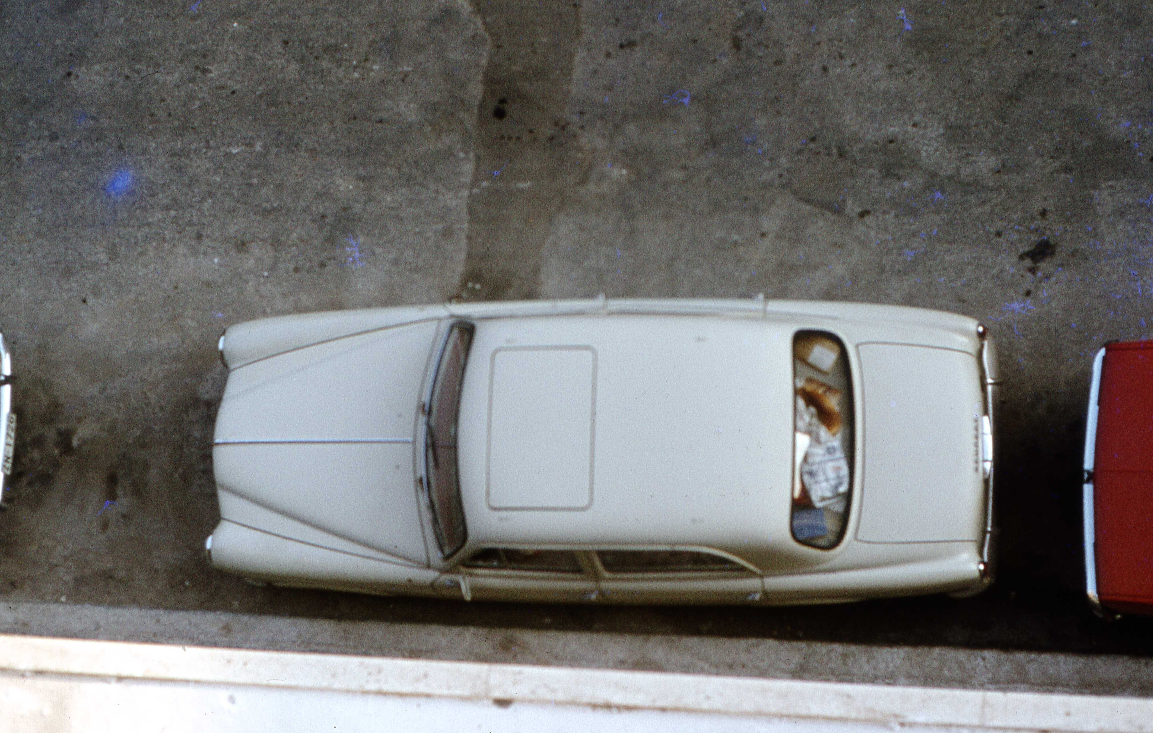 Une automobile Peugeot 403 Luxe Confort avec toit ouvrant vue de dessus. Août 1977.